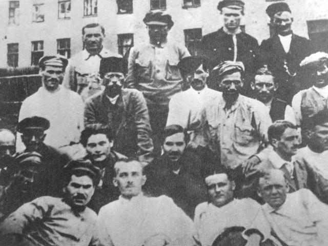 Srpskohrvatski / српскохрватски: Група југословена учесника Октобарске револуције